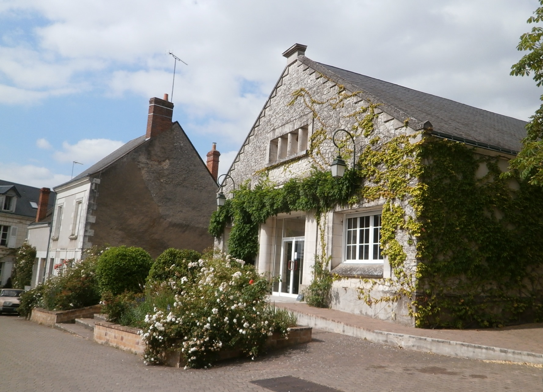 salle des fêtes Meunier-Tulasne (Chédigny)